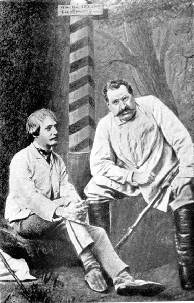 Михаил Провыч Садовский в роли Счастливцева (слева) и Николай Хрисанфович Рыбаков в роли Несчастливцева (справа) в пьесе А. Н. Островского "Лес". Фото из частного архива Марии Савиной